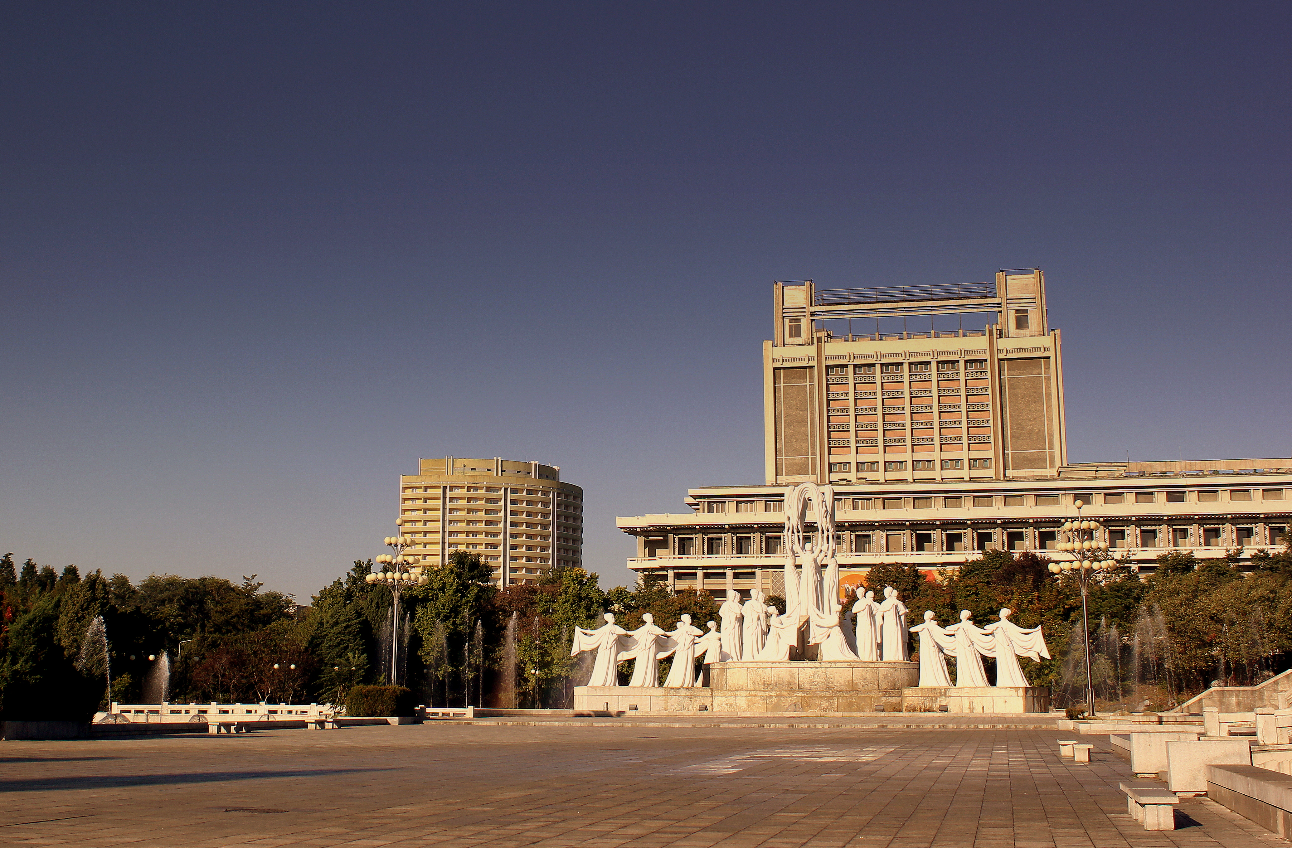 FOUNTAIN PARK PYONGYANG CITY DPR KOREA OCT 2012